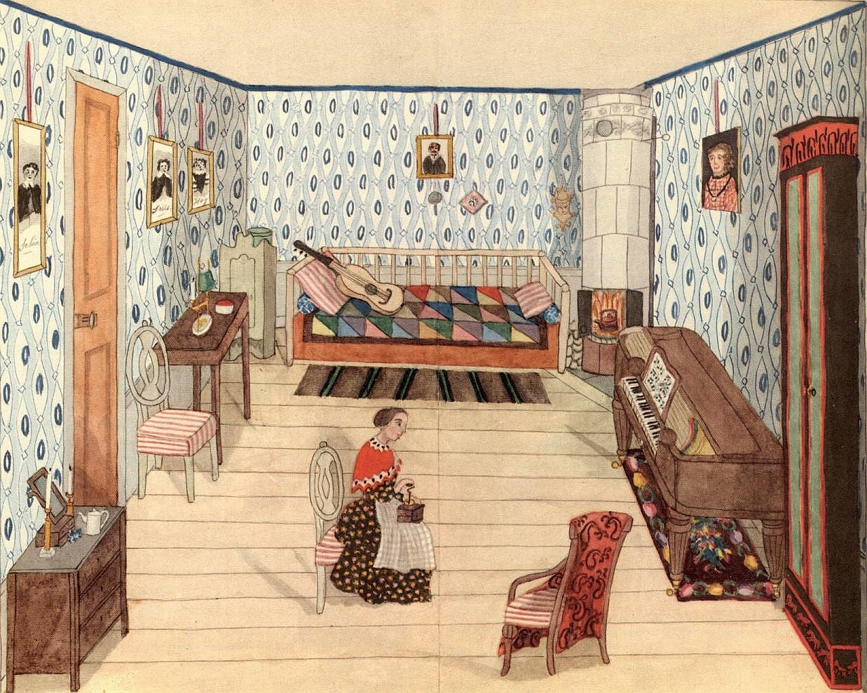 Josabeth Sjöbergs bostad, Kocksgatan 27